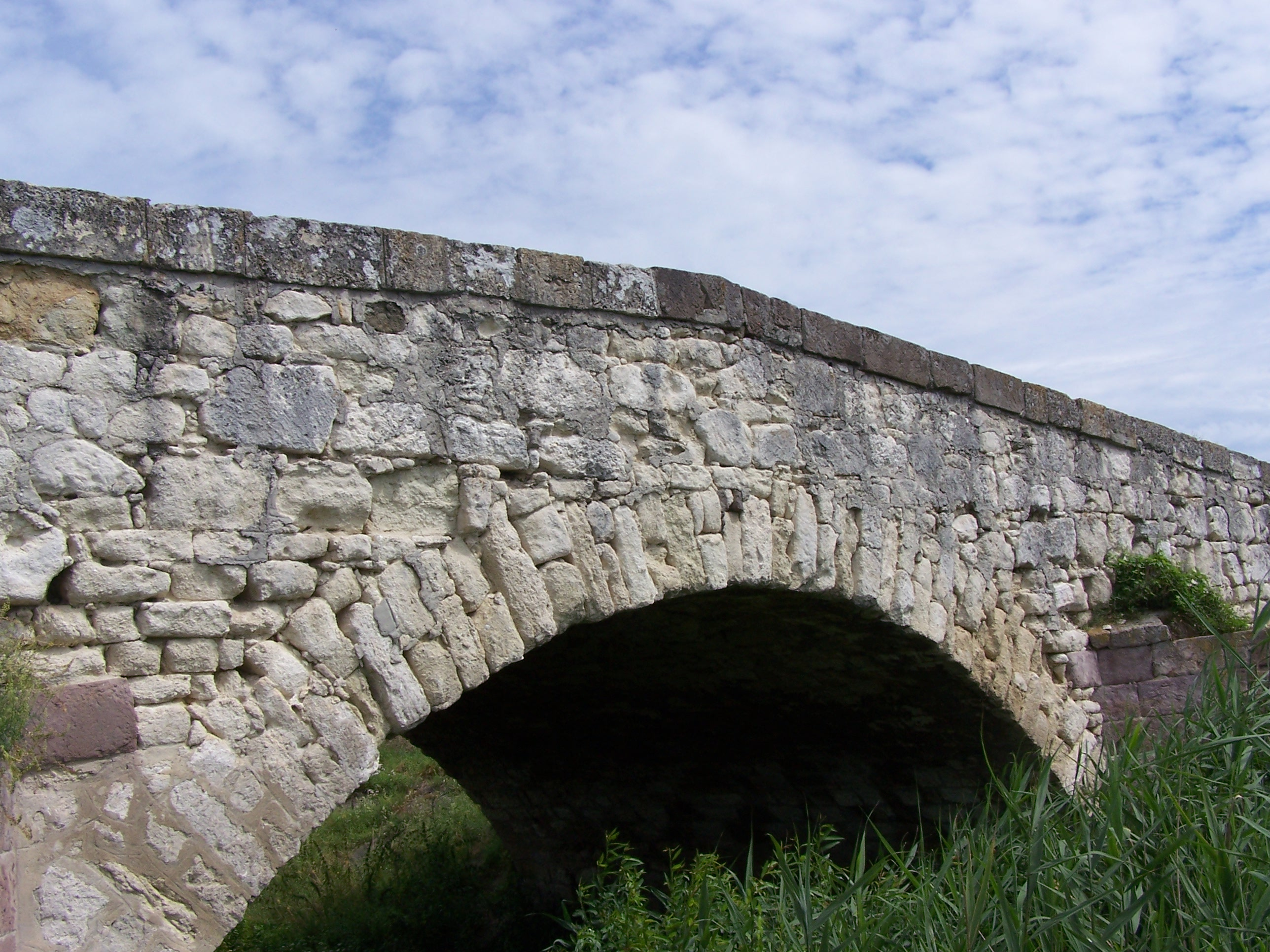 Kőhíd (Héhalom, Bér-patak fölött) This is a photo of a monument in Hungary, Identifier: 6600